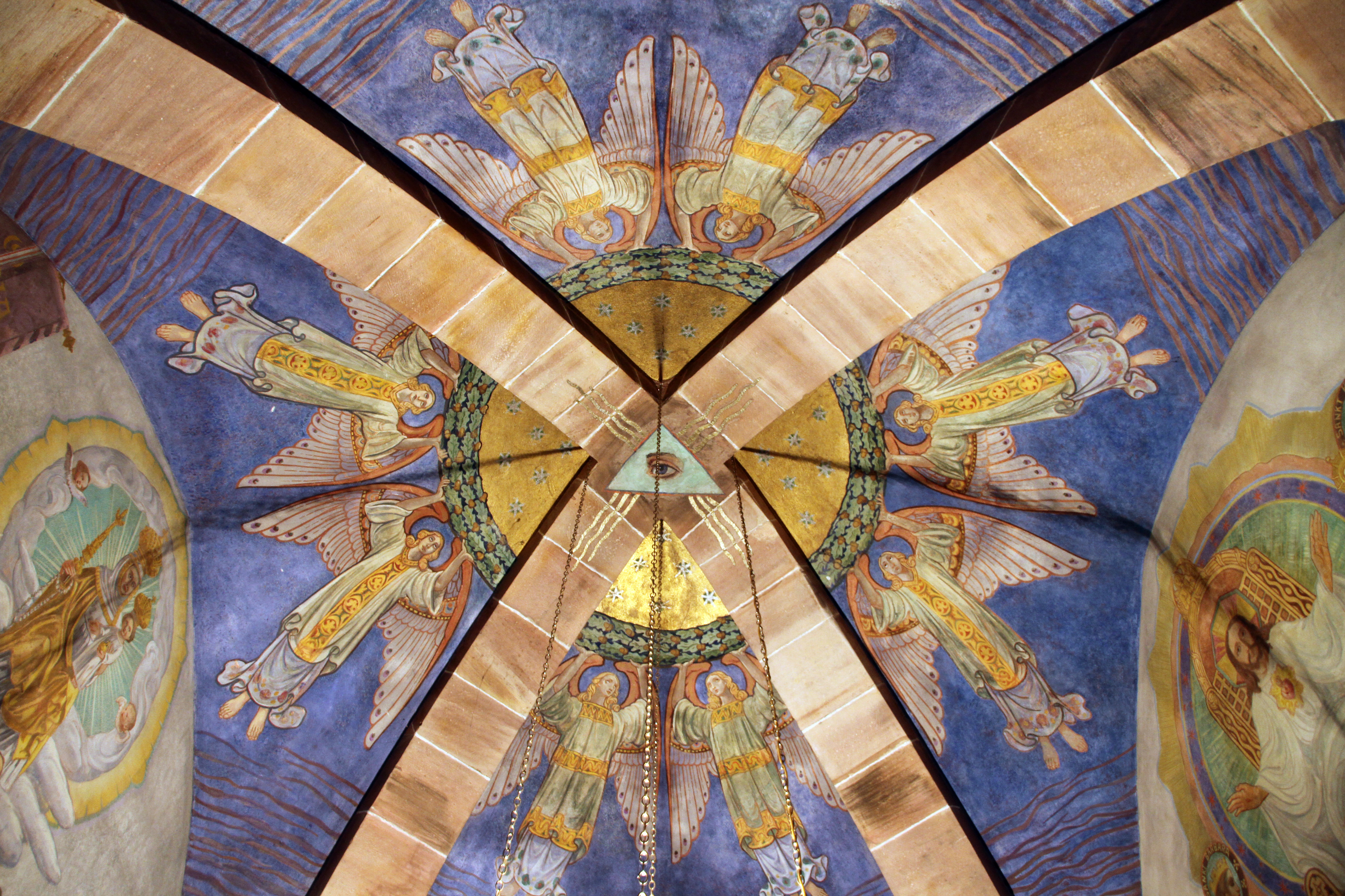 Kirche St. Johannes in Ottersweier, Kapelle im Erdgeschoss des Südturmes. Wandmalereien von Josef Wagenbrenner (1921).